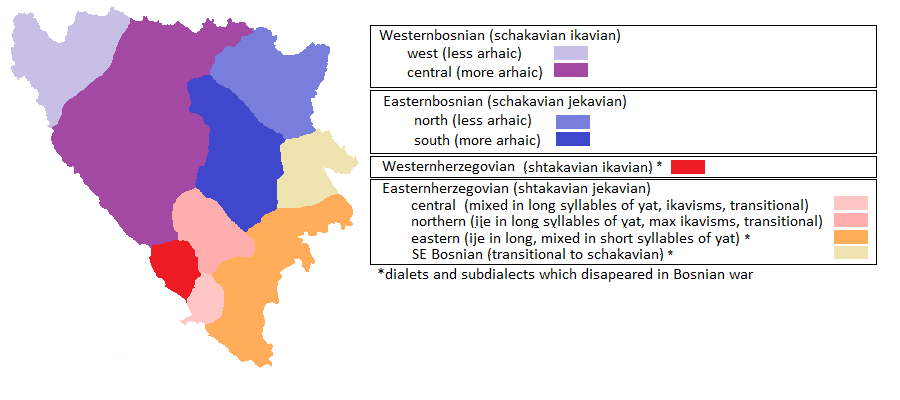 Bošnjački pogled na poddijalekte Bošnjačkog. Kako su za prikaz bitni samo govornici tog jezika granice poddijalekata ne prate dijalektalne granice (za koje su zaslužni i pripadnici drugih naroda).